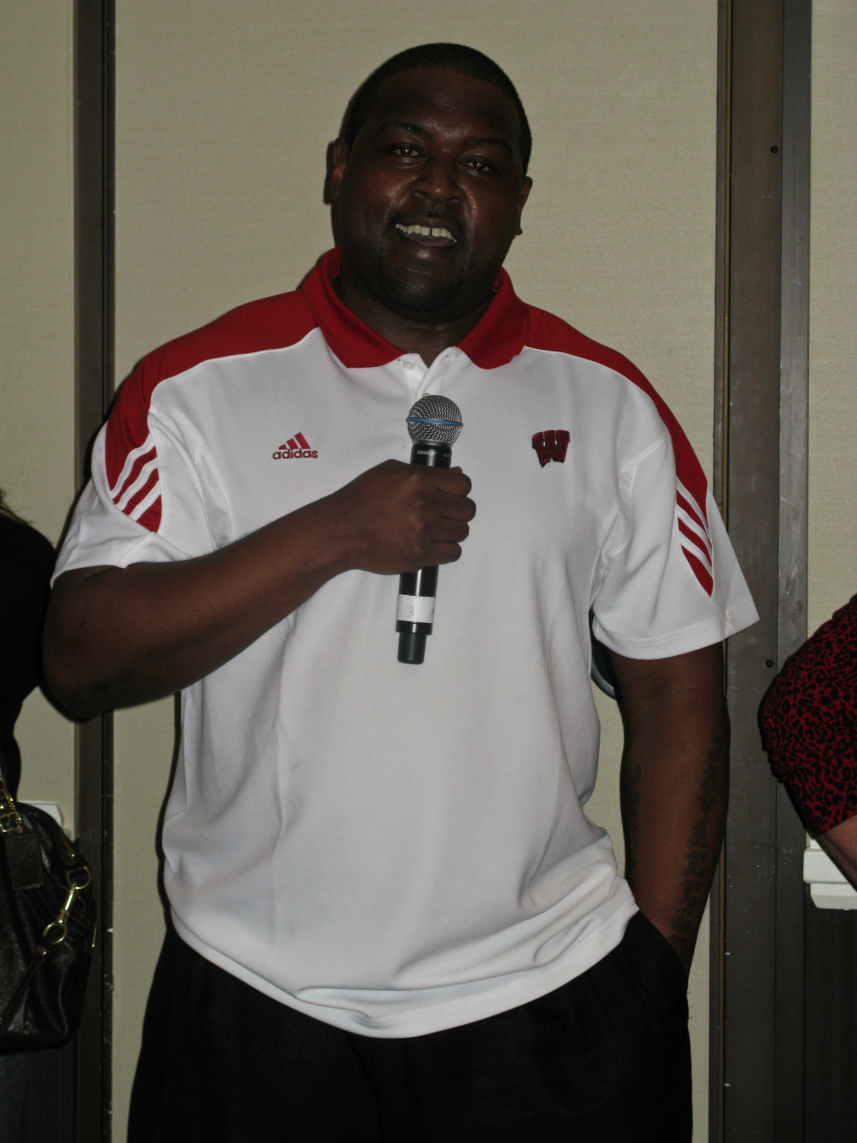 Ron Dayne 2010